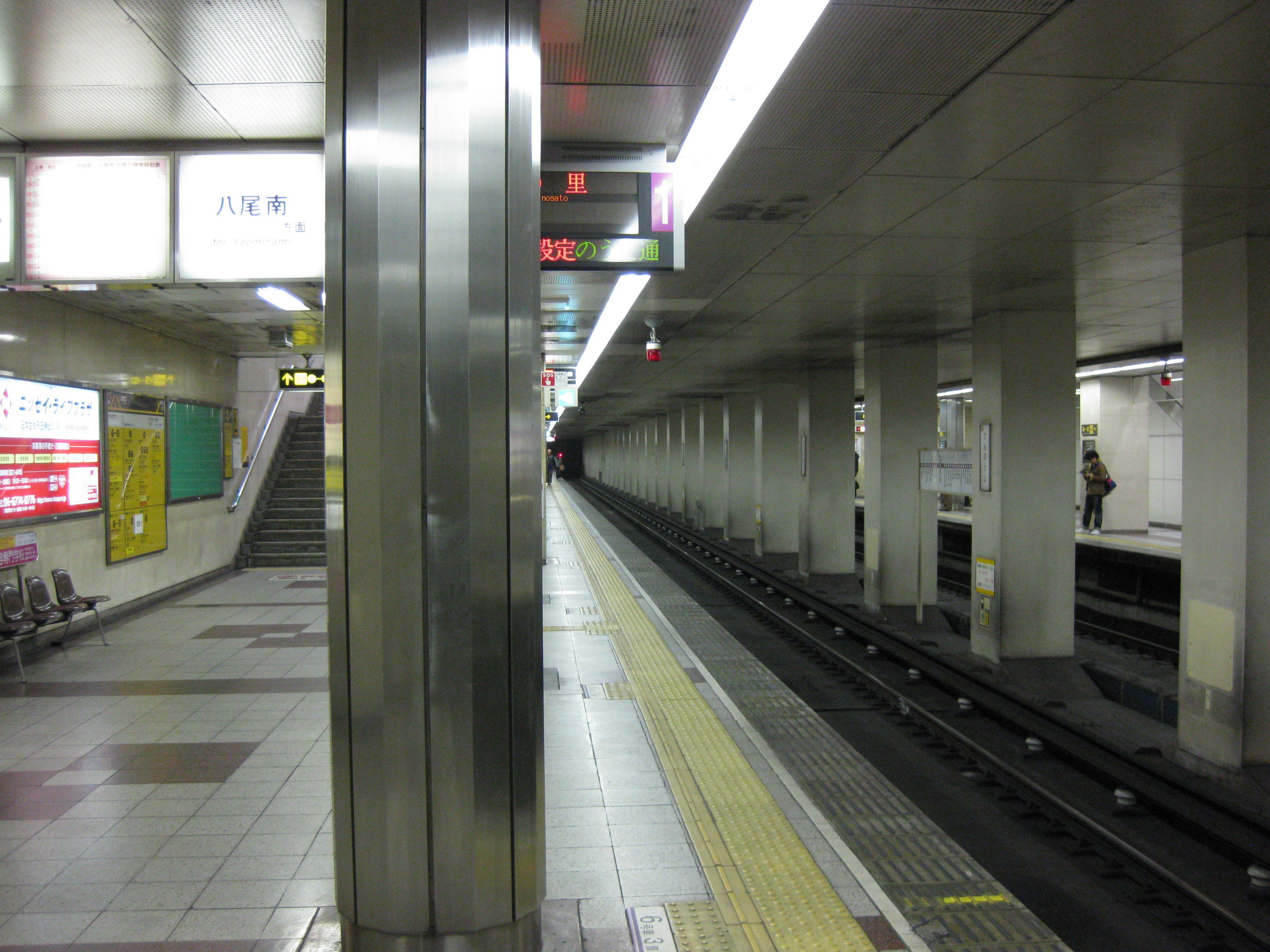 天王寺駅谷町線プラットホーム